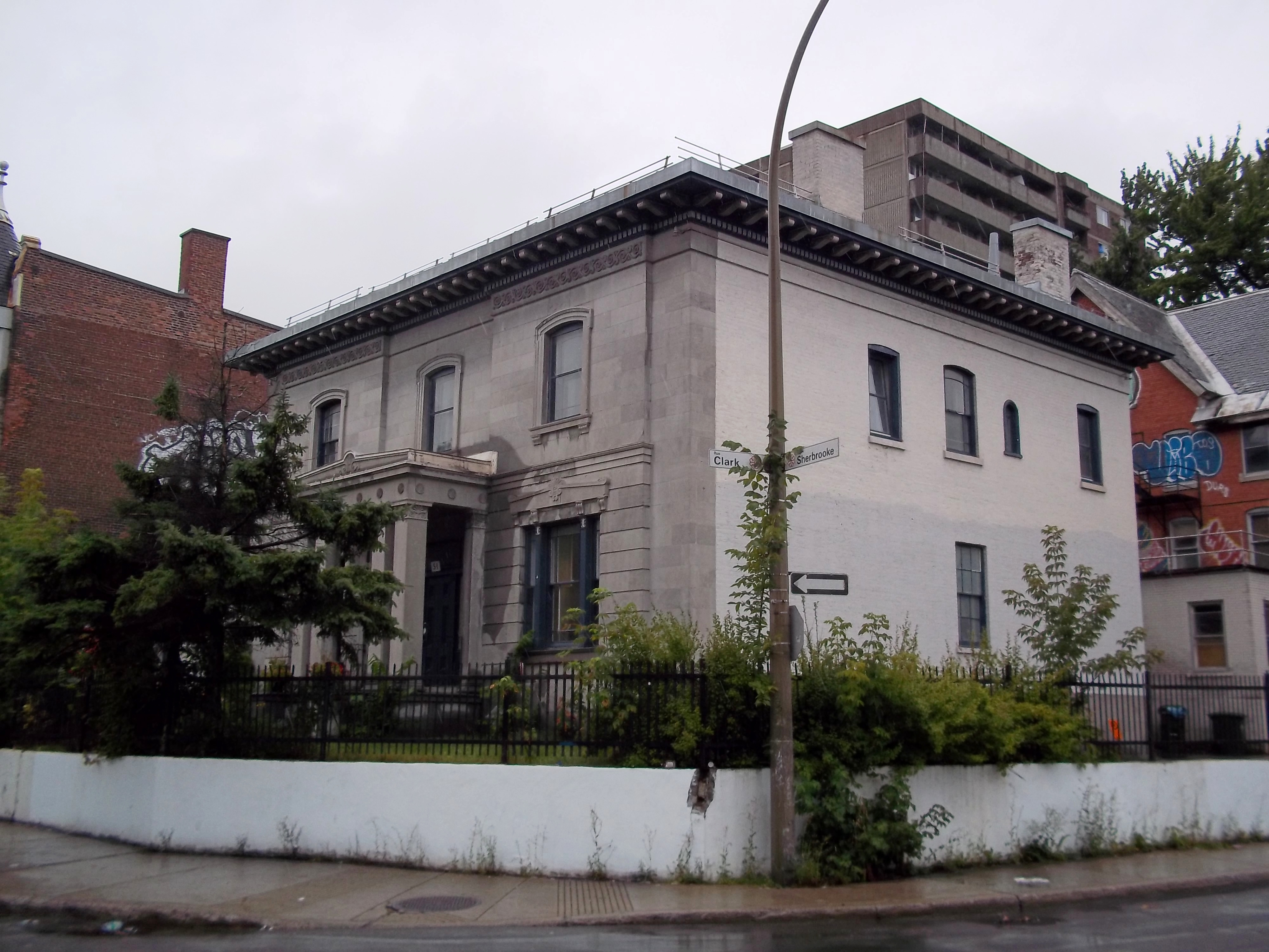 Maison William Collis-Meredith (Maison William-Notman), 51, rue Sherbrooke Ouest, Montréal Grand répertoire du patrimoine bâti de Montréal